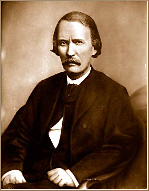 Kit Carson, aus der Library of Congress